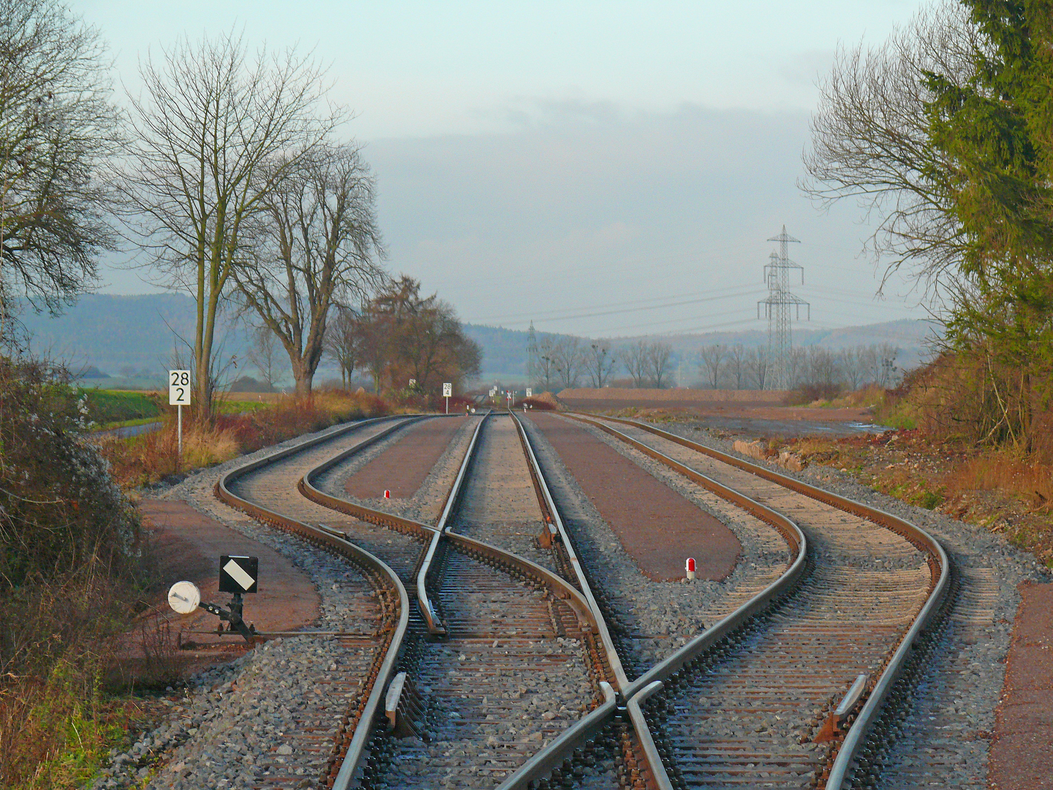 Nach der erfolgten Sanierung sind alle drei Bahnhofsgleise wieder nutzbar.